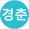 علامت خط مترو در شهر سئول، جمهوری کره